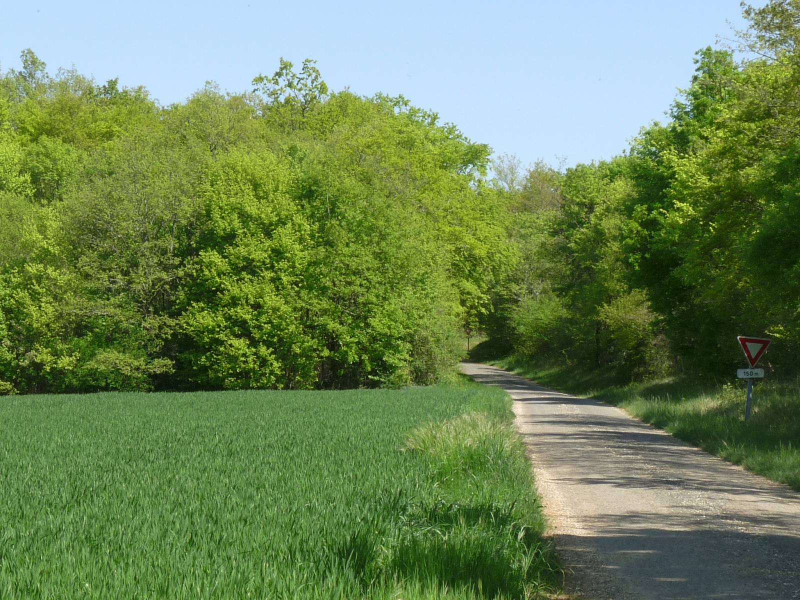 Forêt de Tusson, Villejésus, Charente, France